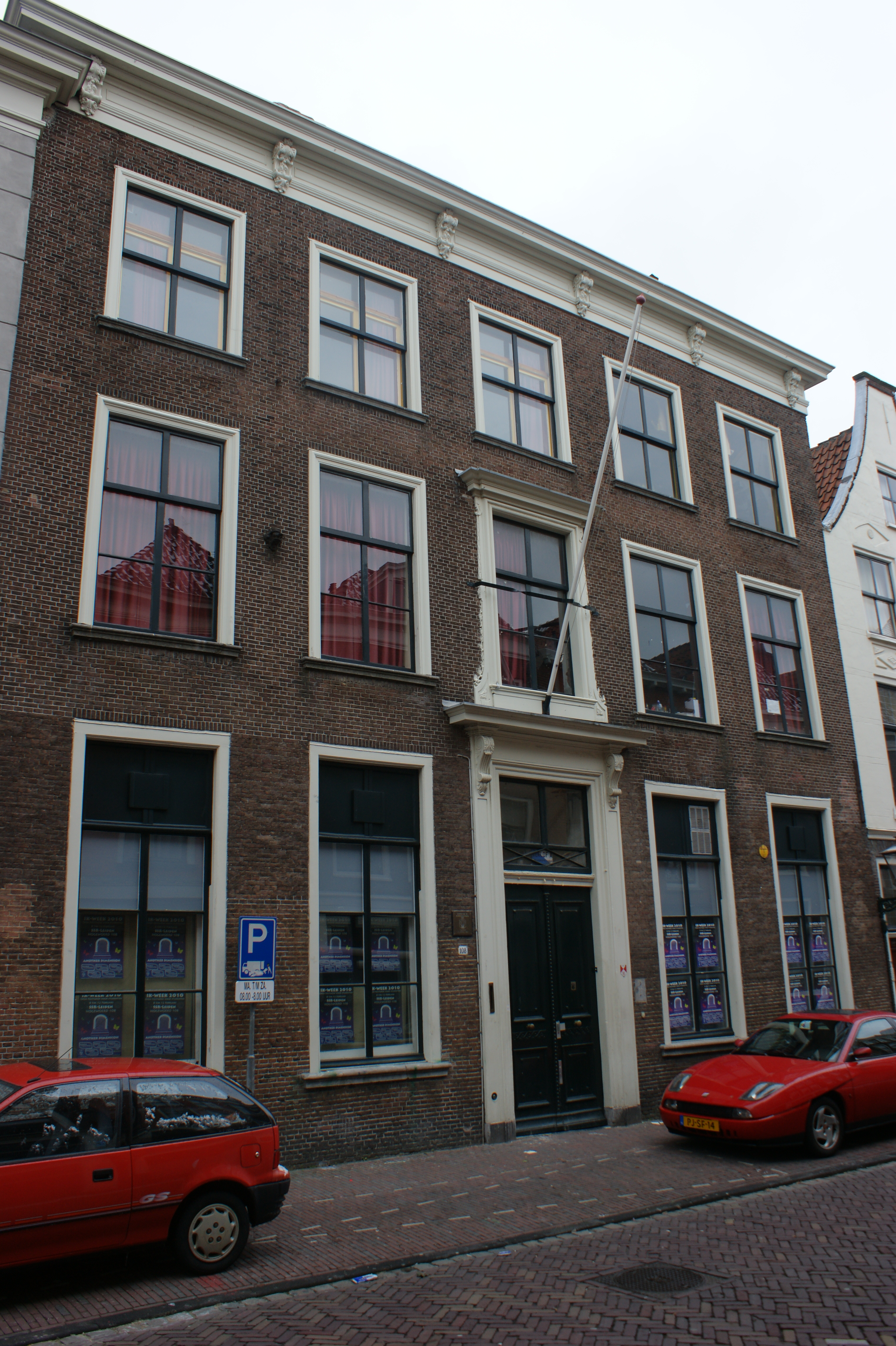 Leiden - Hogewoerd